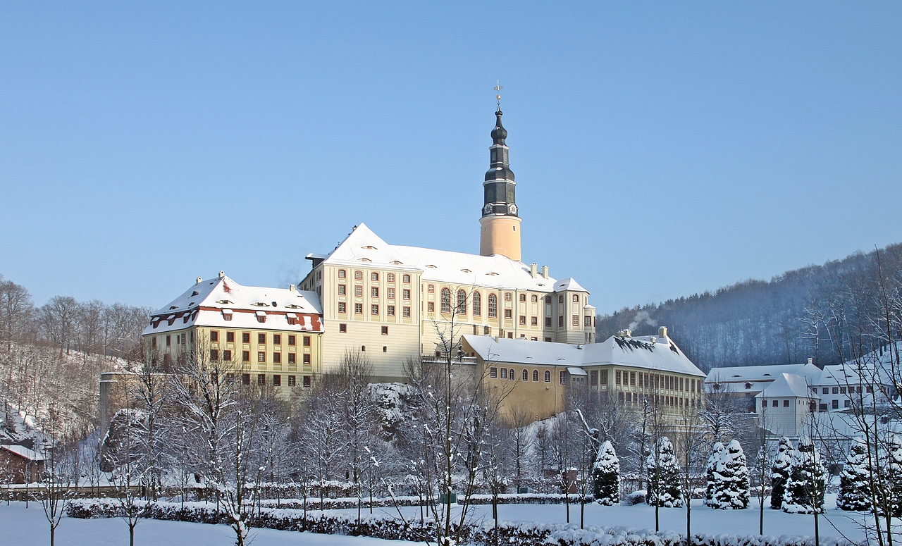 Blick auf das winterliche Schloss Weesenstein im Müglitztal. Das Schloss geht auf eine um 1200 errichtete Grenzburg zurück. Durch viele Umbauten vereint das Schloss heute Stilelemente aus Gotik, Renaissance, Barock und Klassizismus. Ältestes erhaltenes Bauteil ist der um 1300 entstandene Rundturm.